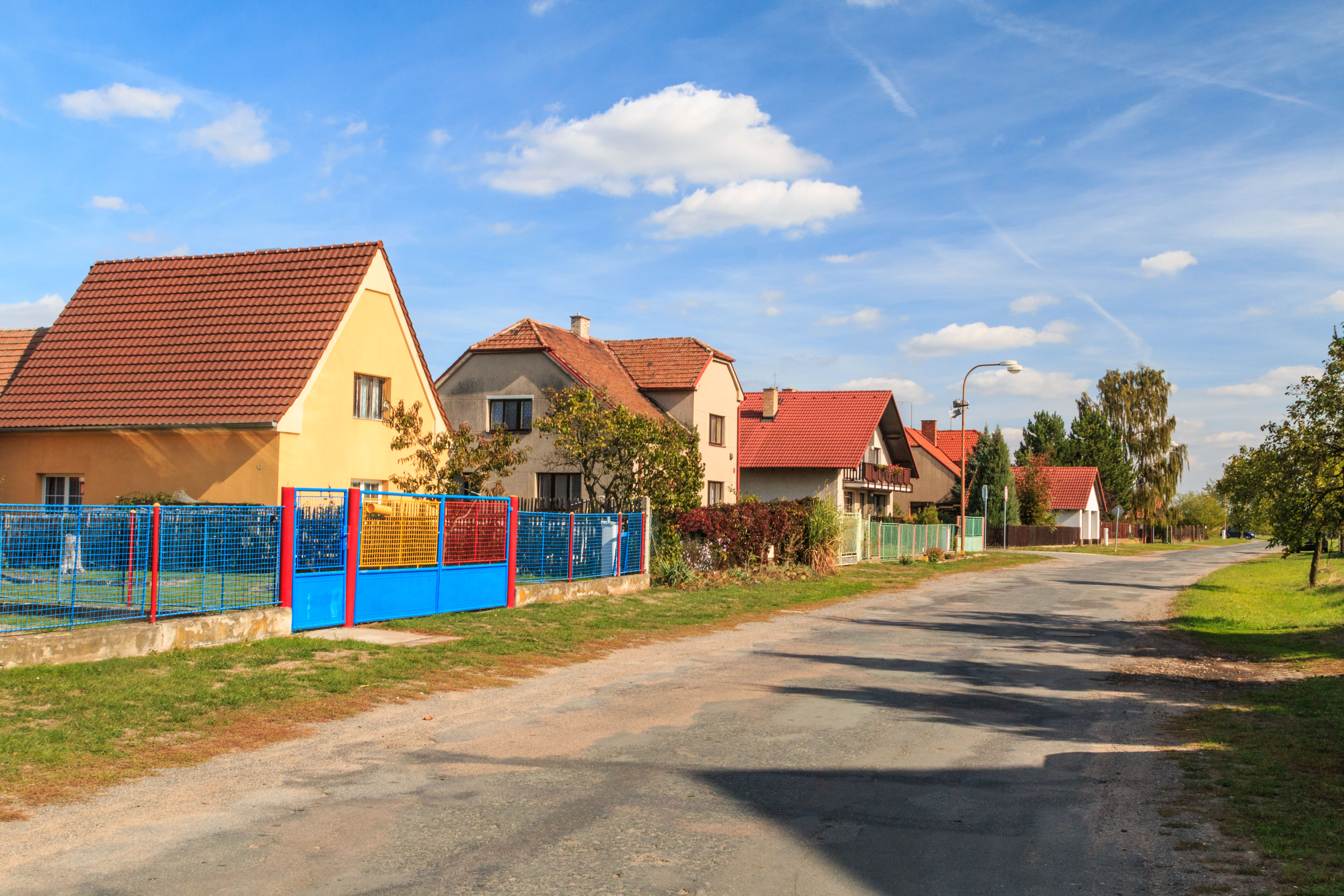 Labětín - dům čp. 87 Project: Vodstvo.